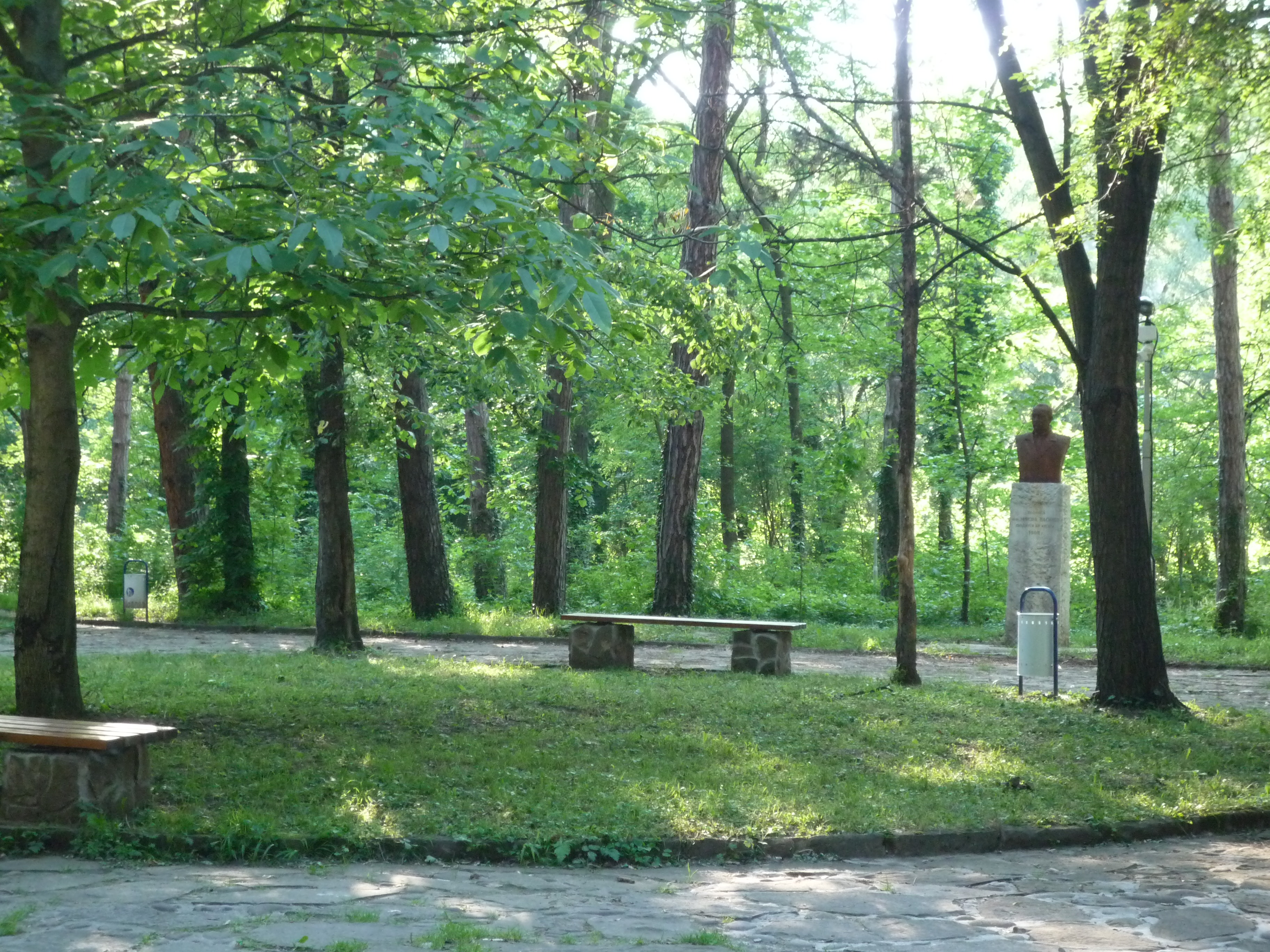 Баш Бунар